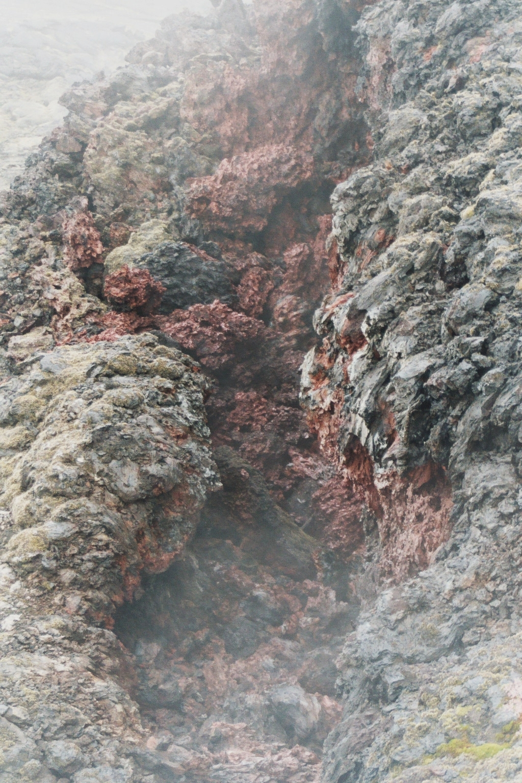 De la lave dans une coulée du Leirhnjúkshraun, en Islande. La photographie a été prise en juillet 2004 par Johann Dréo (nojhan) sur le chemin qui parcours la coulée de lave, au milieu de la zone à fumerolles. Taille de l'image : 1536 x 1024, photographie numérisée à partir d'une pellicule argentique. Voir la page sur Krafla pour plus d'informations sur le lieu.